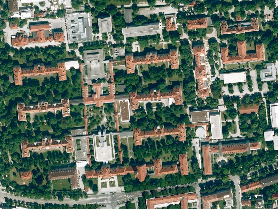 Luftaufnahme der Bayerischen Vermessungsverwaltung: Klinikum Schwabing in München, bayern.